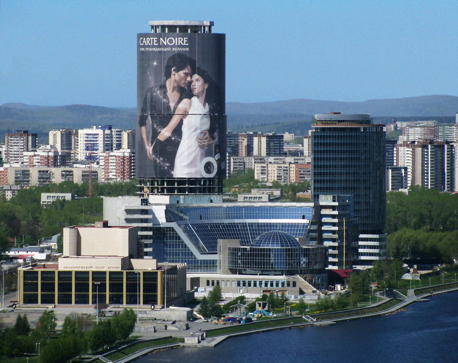 Бизнес-центр "Демидов" в замороженном состоянии, затянутый рекламным баннером, май 2010